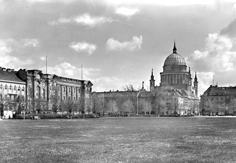 Potsdam.- Wilhelmsplatz